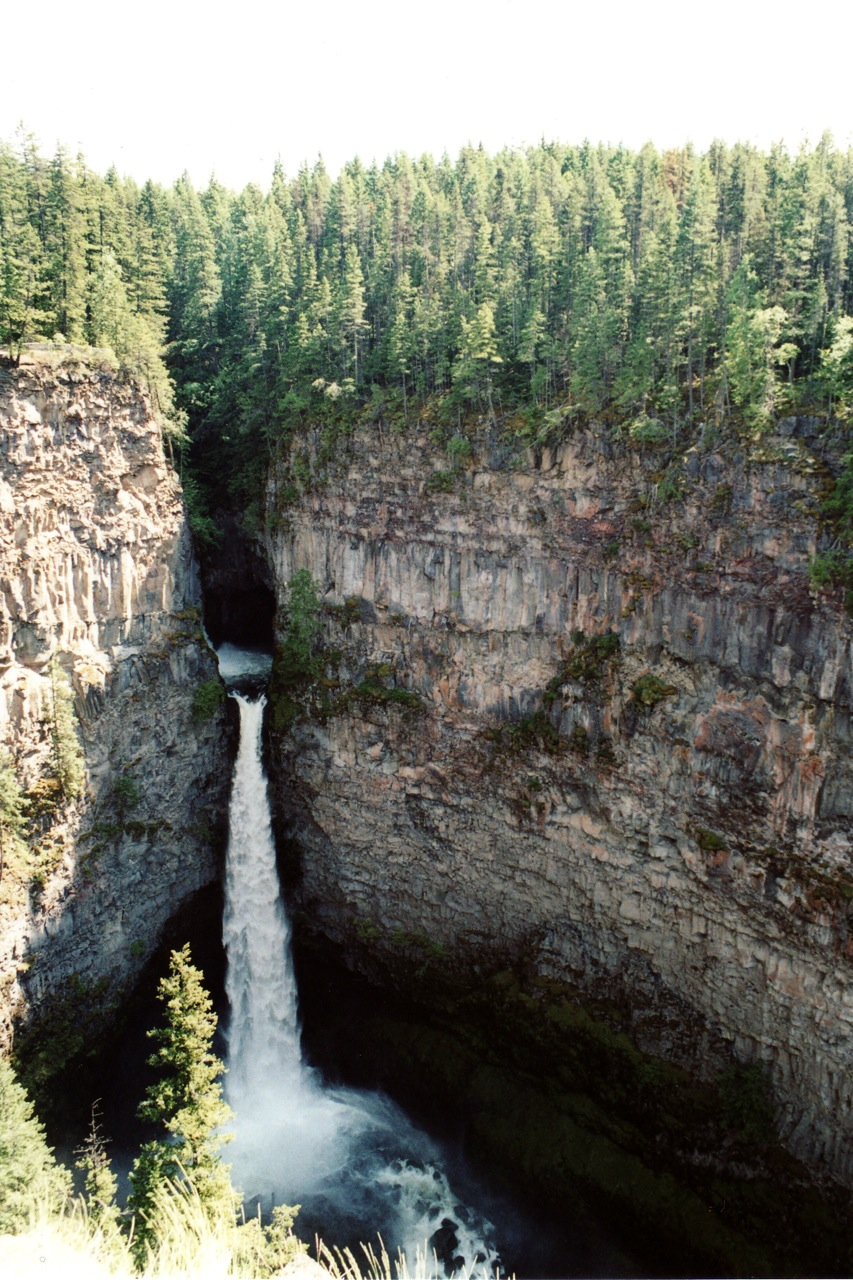 Spahats Falls (Wells Gray Provincial Park)